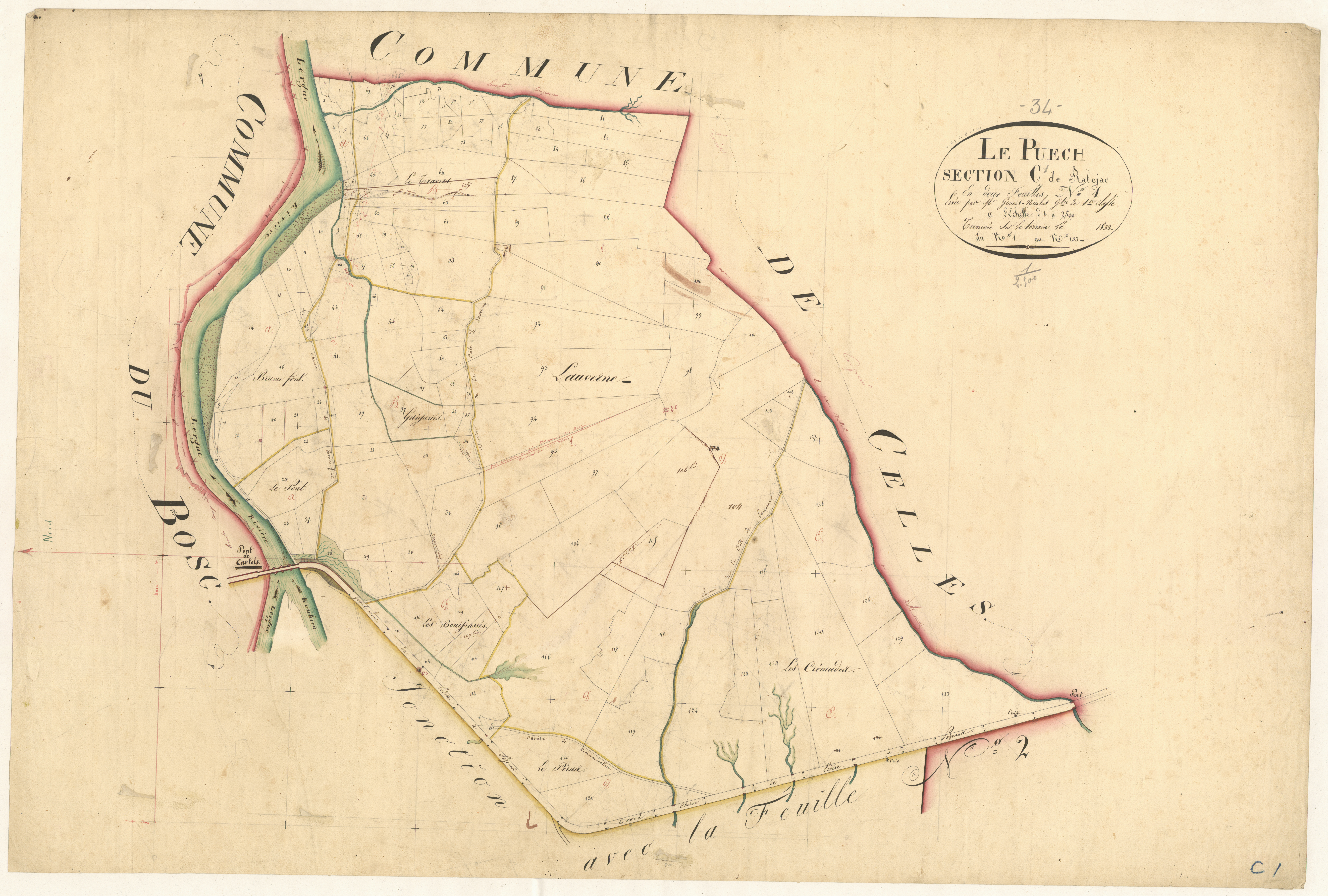 Le Puech. - Cadastre napoléonien : section C1 de Rabejac.